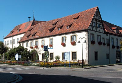 Schloss und Rathaus Schrozberg